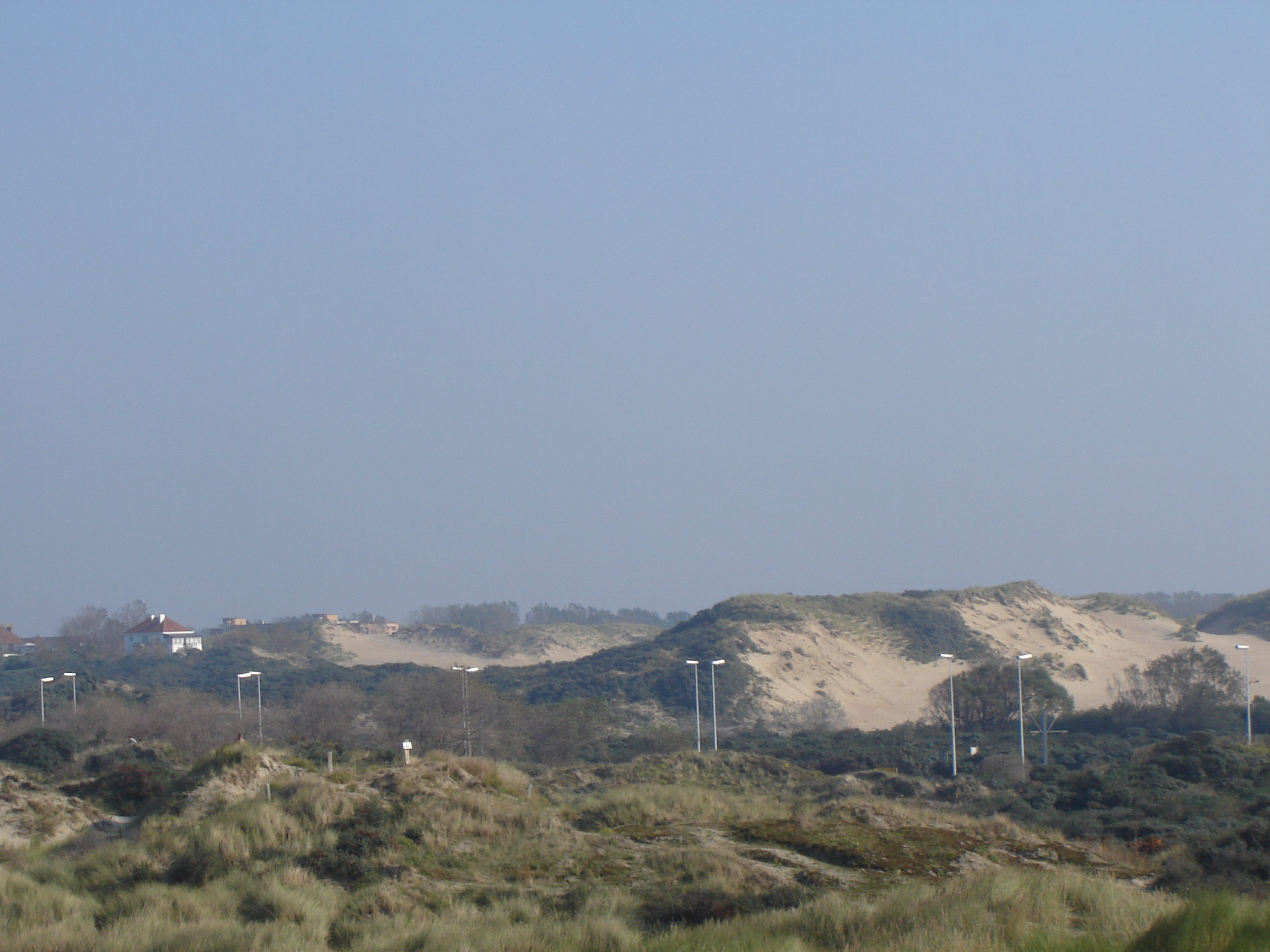 Duinencomplex Ter Yde, gezien vanaf de Zeebermduinen, Oostduinkerke. Ter Yde dunes as seen from Zeebermduinen dunes in Oostduinkerke, Koksijde, Belgium